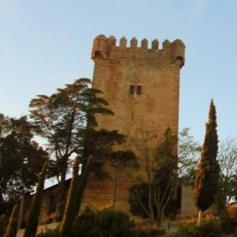 Castle of Montemayor, Córdoba, España